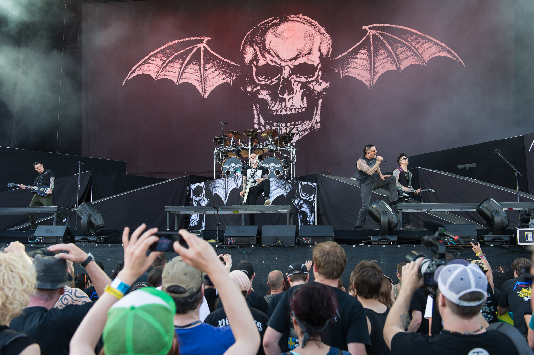 ARGO-Konzerte,Arin Ilejay,Avenged Sevenfold,Brian Elwin Haner Jr.,Johnny Christ,Jonathan Lewis Seward,Konzert,Livekonzert,Livemusik,M. Shadows,Matthew Charles Sanders,Musik,RiP,Rock im Park 2014,Spectators,Synyster Gates,Zachery James Baker,Zacky Vengeance,Zuschauer